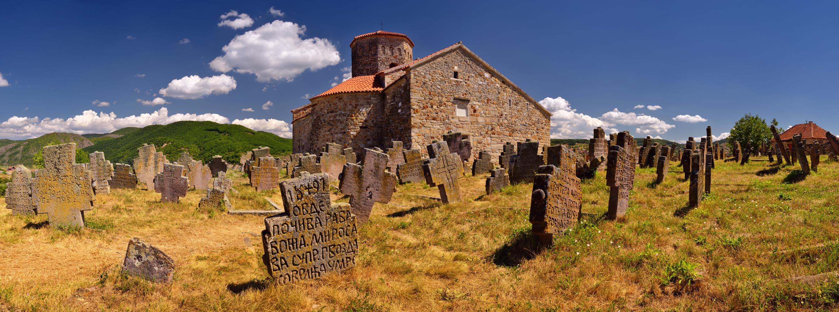 Srpski (latinica): Crkva Svetih Apostola Petra i Pavla, Novi Pazar